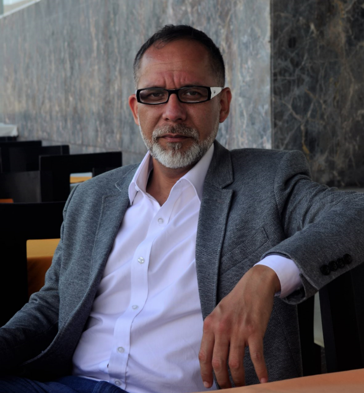 Foto del escritor Ramón Bueno Tizón